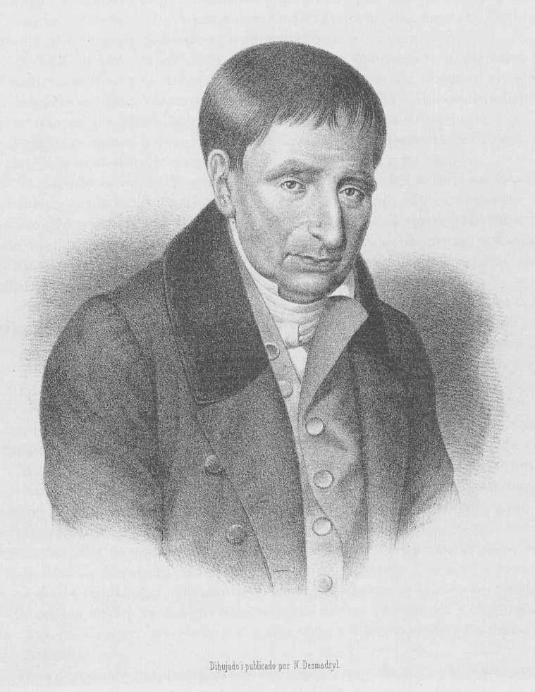 Manuel de Salas Corvalán (* Santiago, 19 de junio de 1754 - † 28 de noviembre de 1841) fue un destacado educador y patriota por la causa de la independencia de Chile. Es considerado uno de los fundadores de la república.